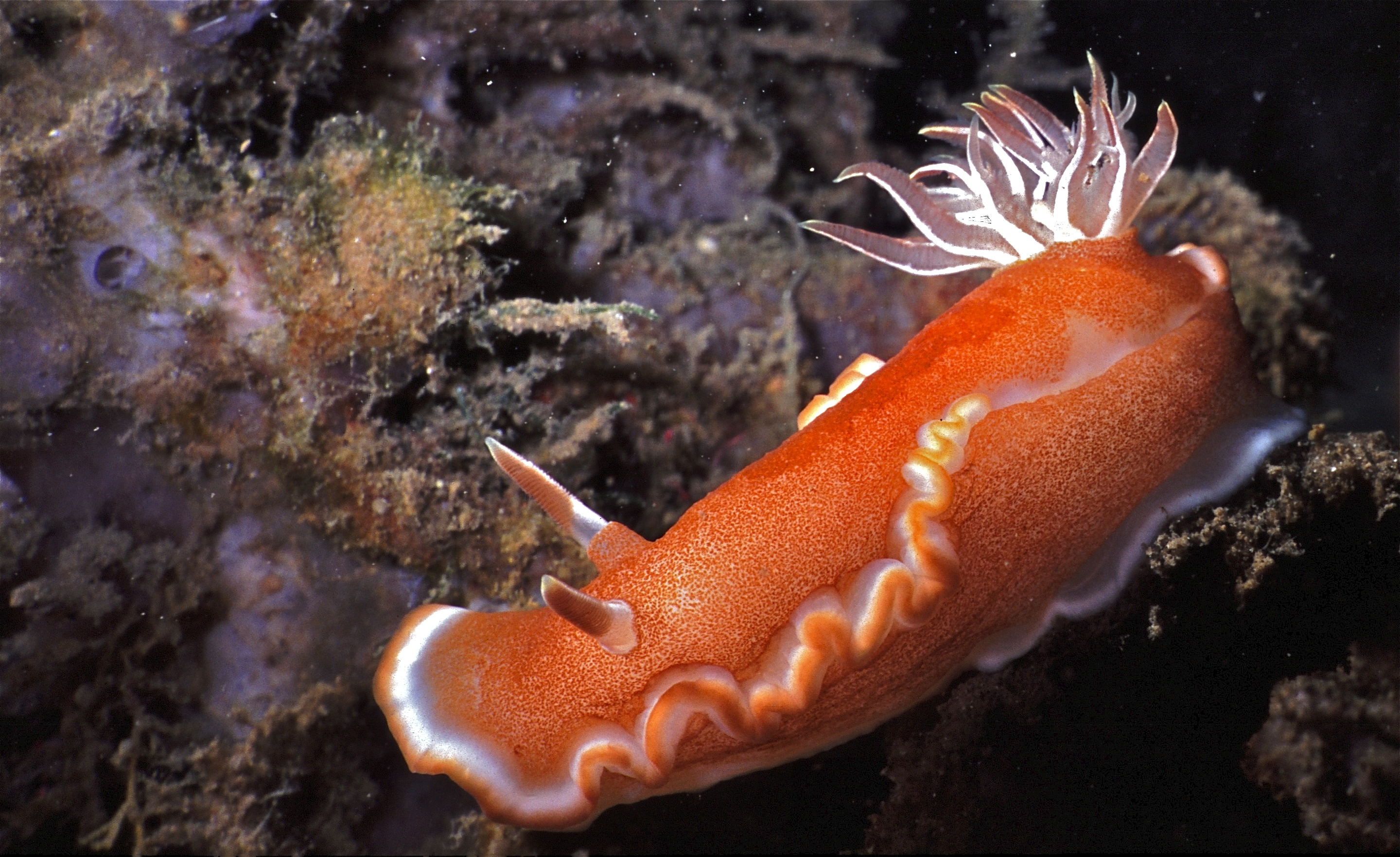 Bunaken, Sulawesi, INDONESIA